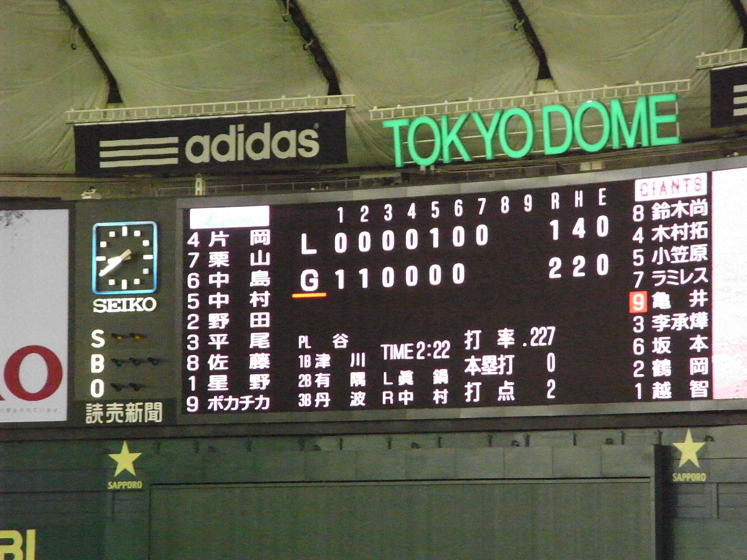 日本選手権シリーズ